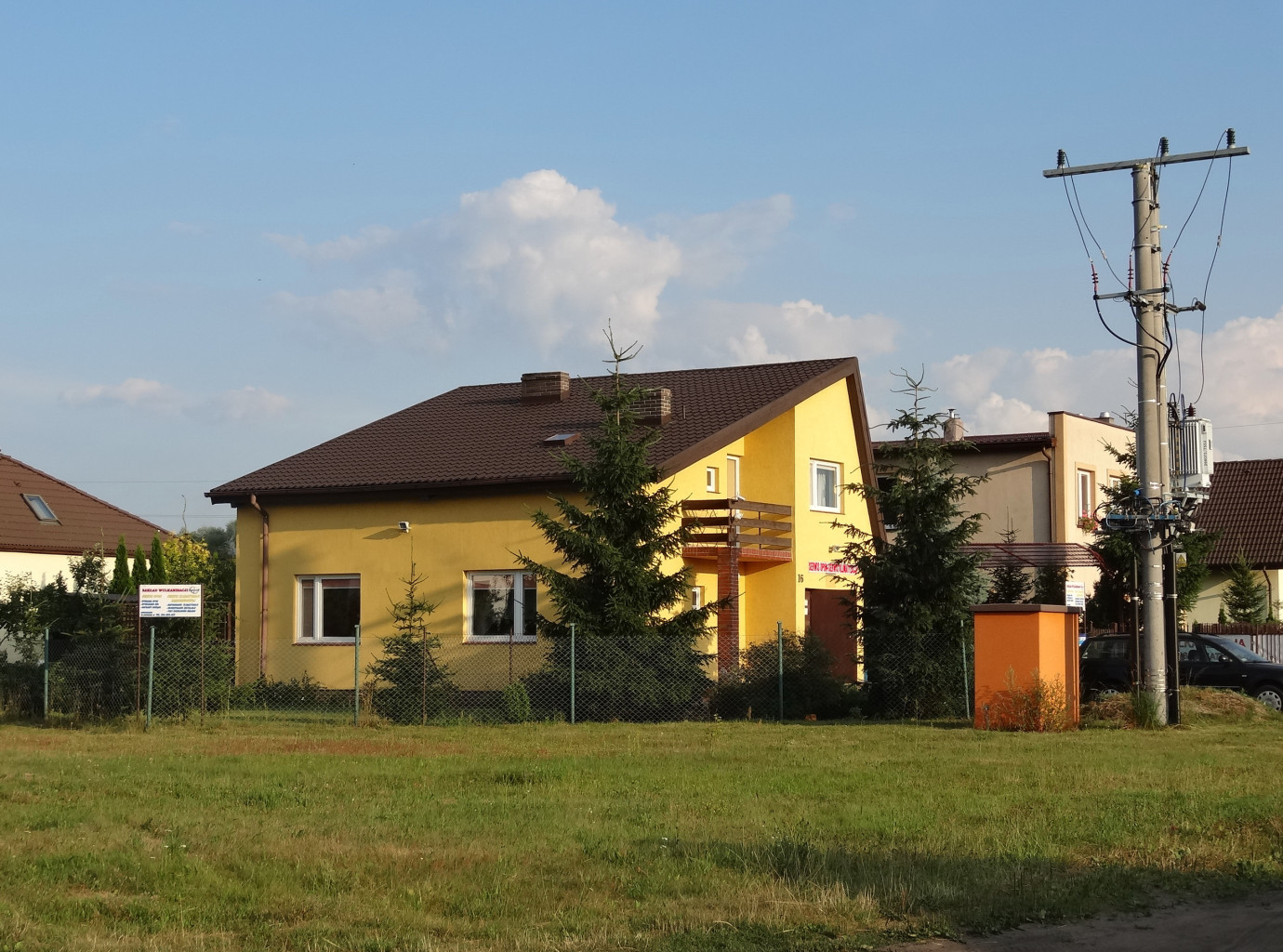 Zabudowa w miejscowości Murowaniec, gmina Białe Błota, powiat bydgoski, województwo kujawsko-pomorskie